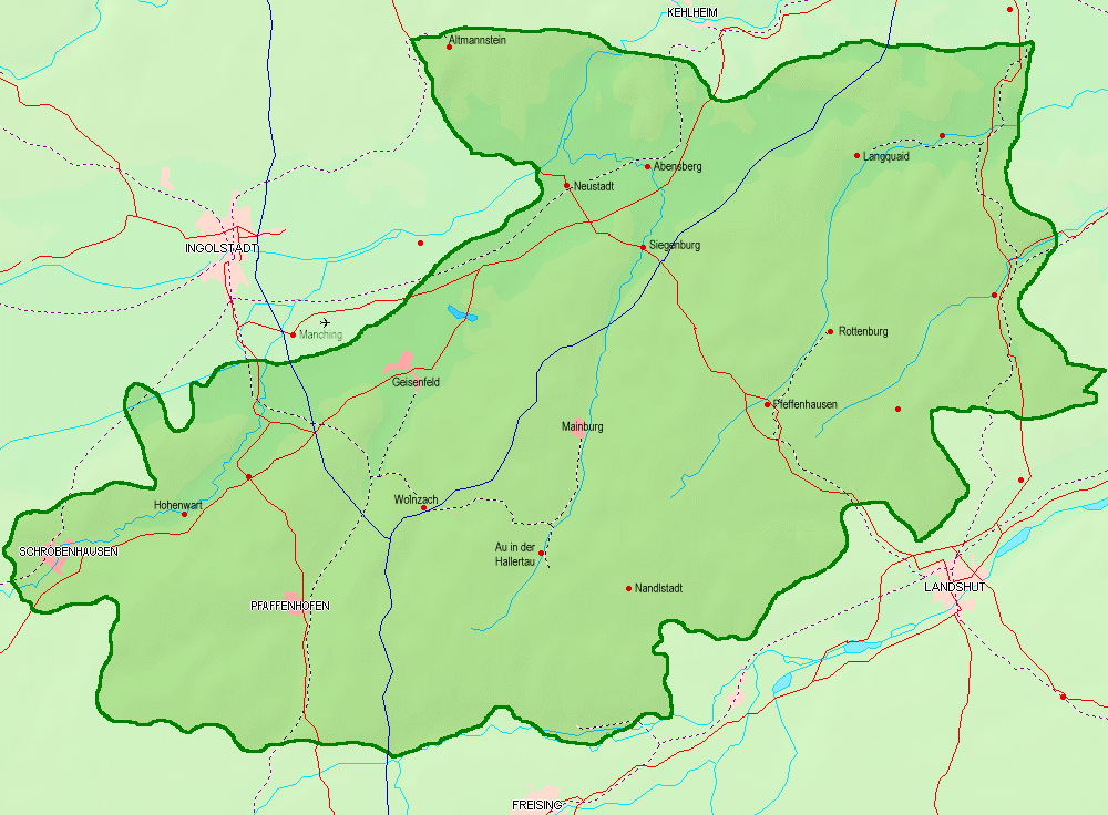 Hallertau